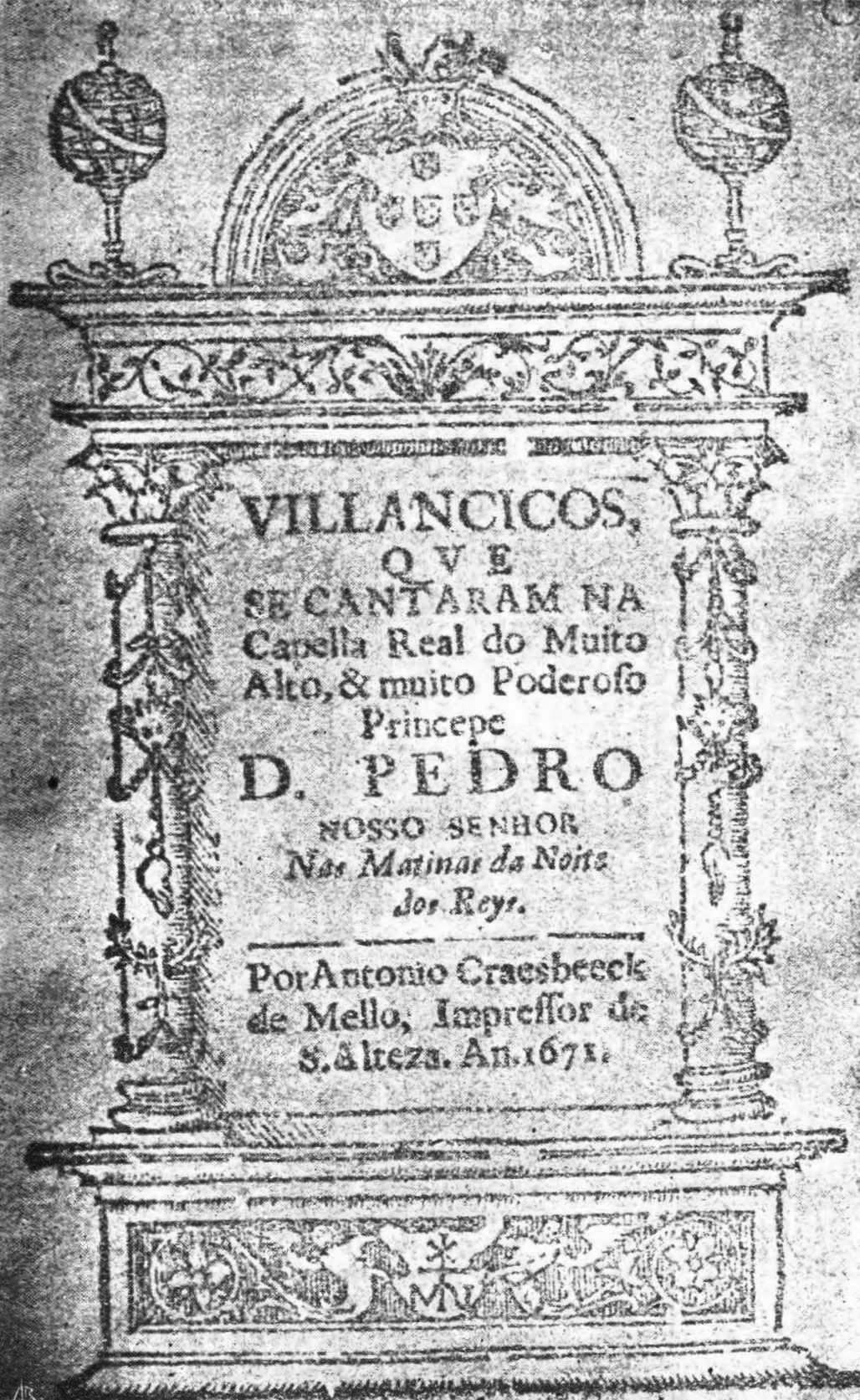 Villancicos que se cantaram na Capella Real do Muito Alto, & muito Poderoso Princepe D. Pedro NOSSO SENHOR Nas Matinas da Noite dos Reys. 1671